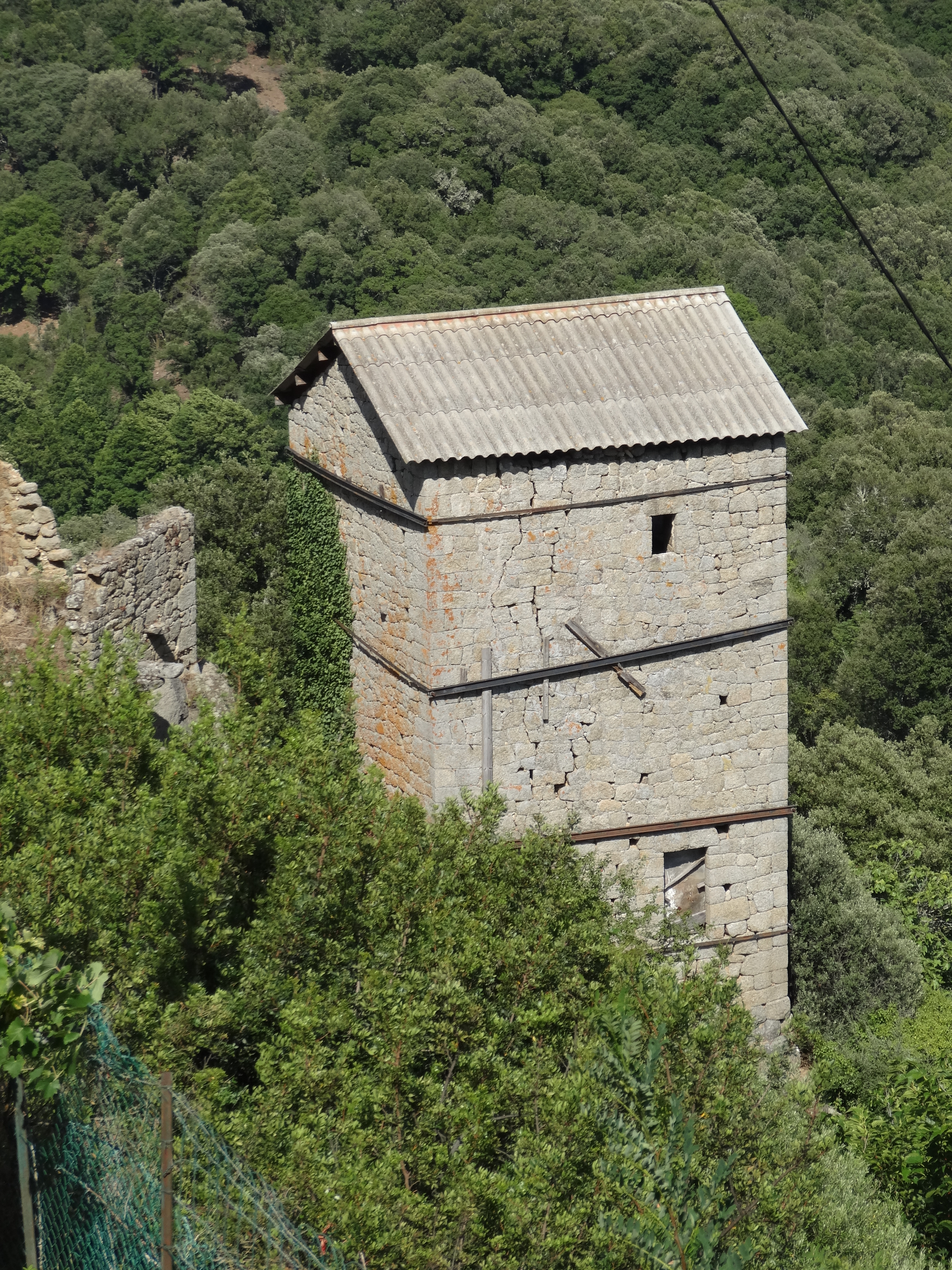 Maison forte d'Urbalacone (16 ème siècle)